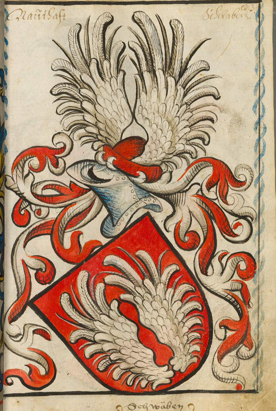 Scheibler'sches Wappenbuch, älterer Teil Notthafft